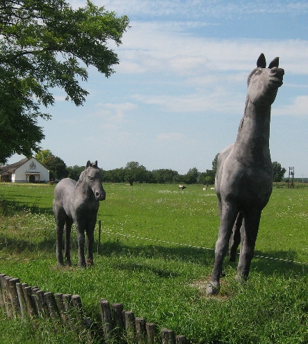 Mecsér-pusztacsárda, lószobrok, Magyarország